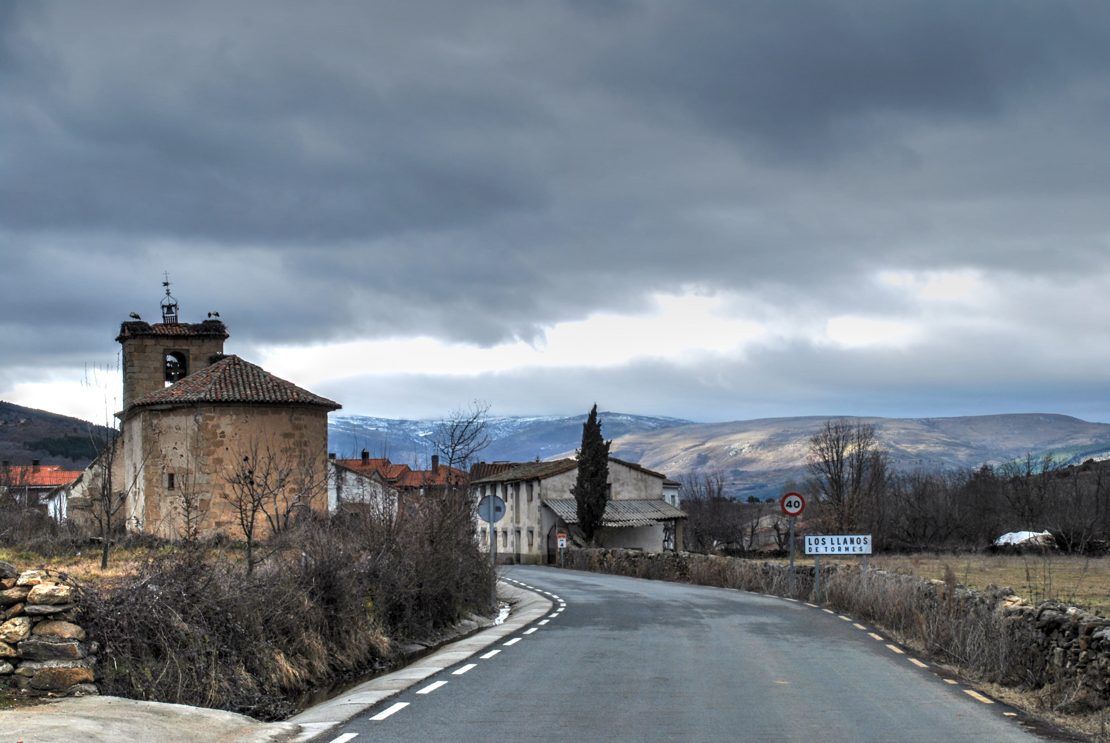 Los Llanos de Tormes